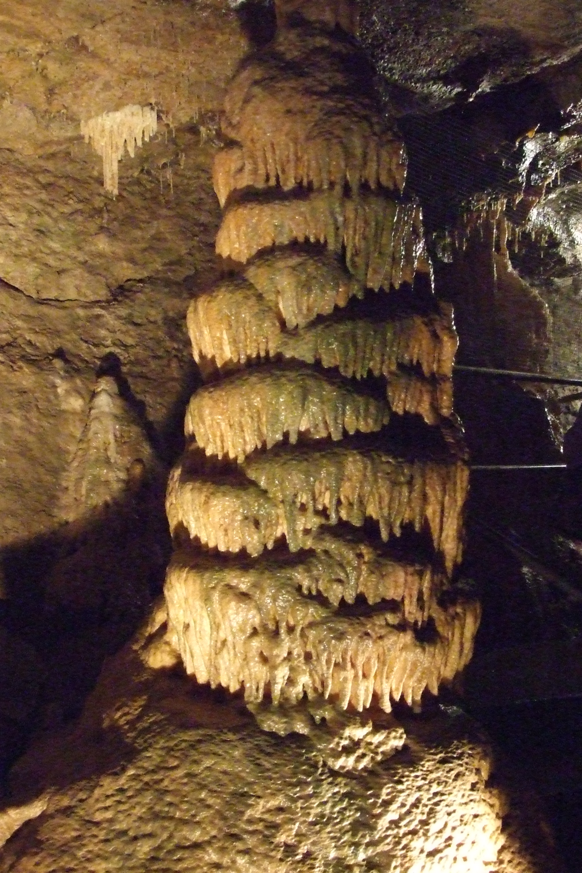 Hotton Caves, Hotton, Belgium